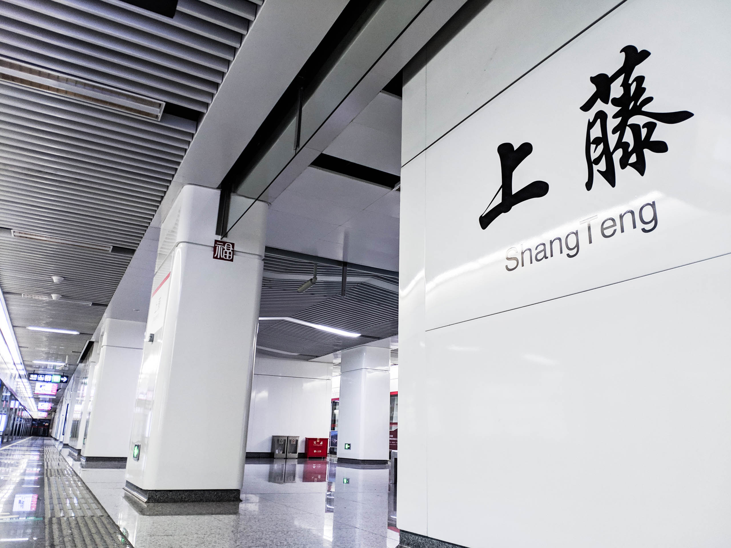 中文（中国大陆）: 福州地铁1号线上藤站